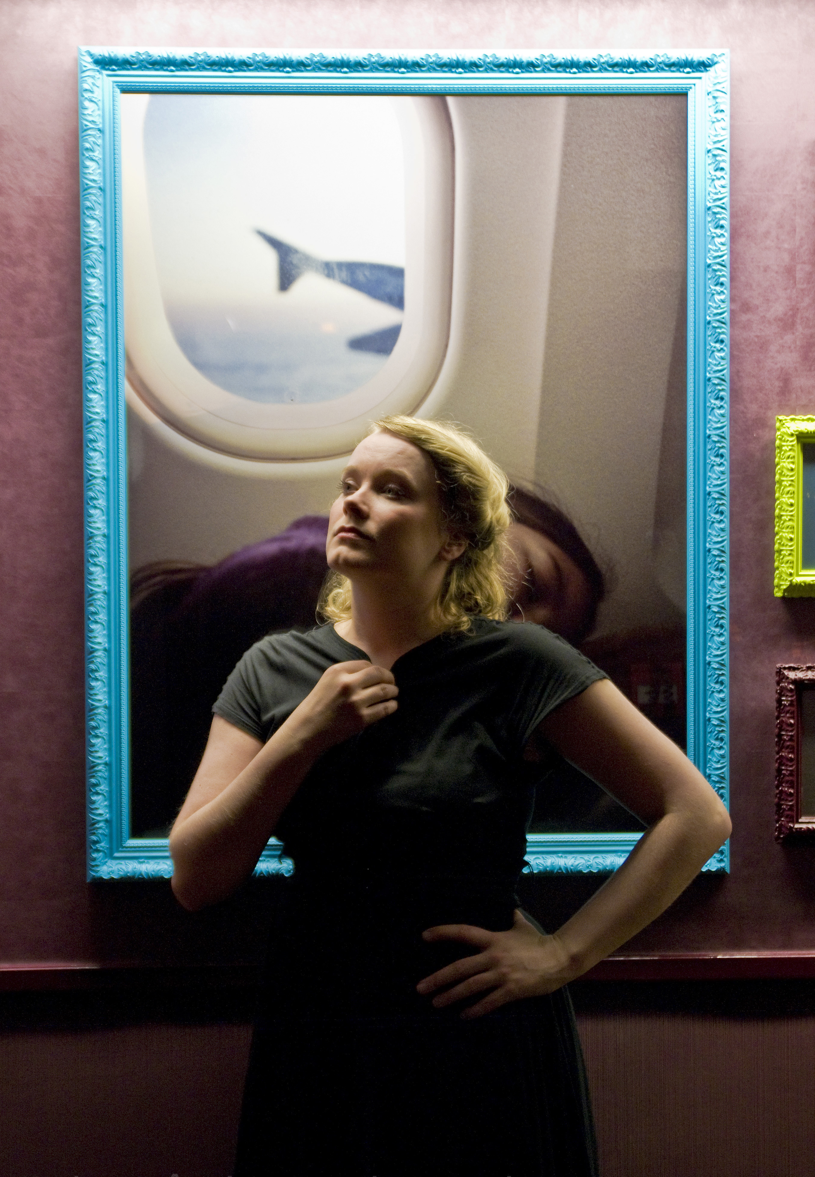 En interview sur Le Cargo